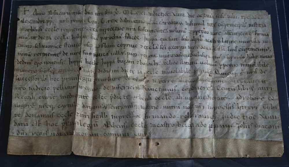 Odredba i potvrda kralja Petra Krešimira IV. o području Rapske biskupije (8. srpnja 1071. U Biogradu). HR-HDA-876-7. Hrvatski državni arhiv